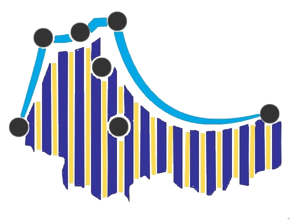 شعار جهة طنجة تطوان الحسيمة